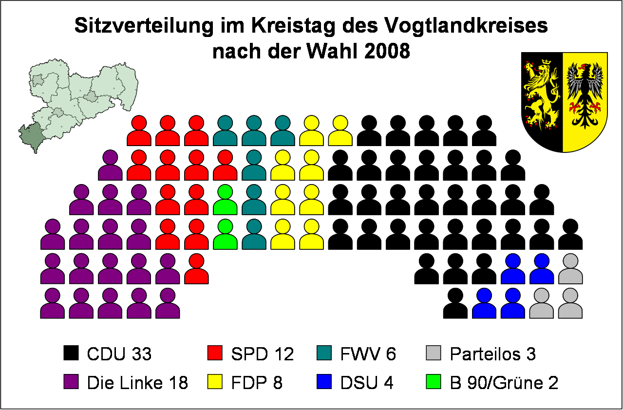 Sitzverteilung im Kreistag des Vogtlandkreises nach der Wahl vom 8. Juni 2008